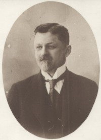 Карл Карлович Гиппиус (1864—1941) — московский архитектор, мастер эклектики и модерна. Известен как семейный архитектор московских купцов Бахрушиных, строитель чайного магазина Перловых на Мясницкой. Аквариумист-любитель, один из организаторов, а в советское время — главный архитектор Московского зоопарка.